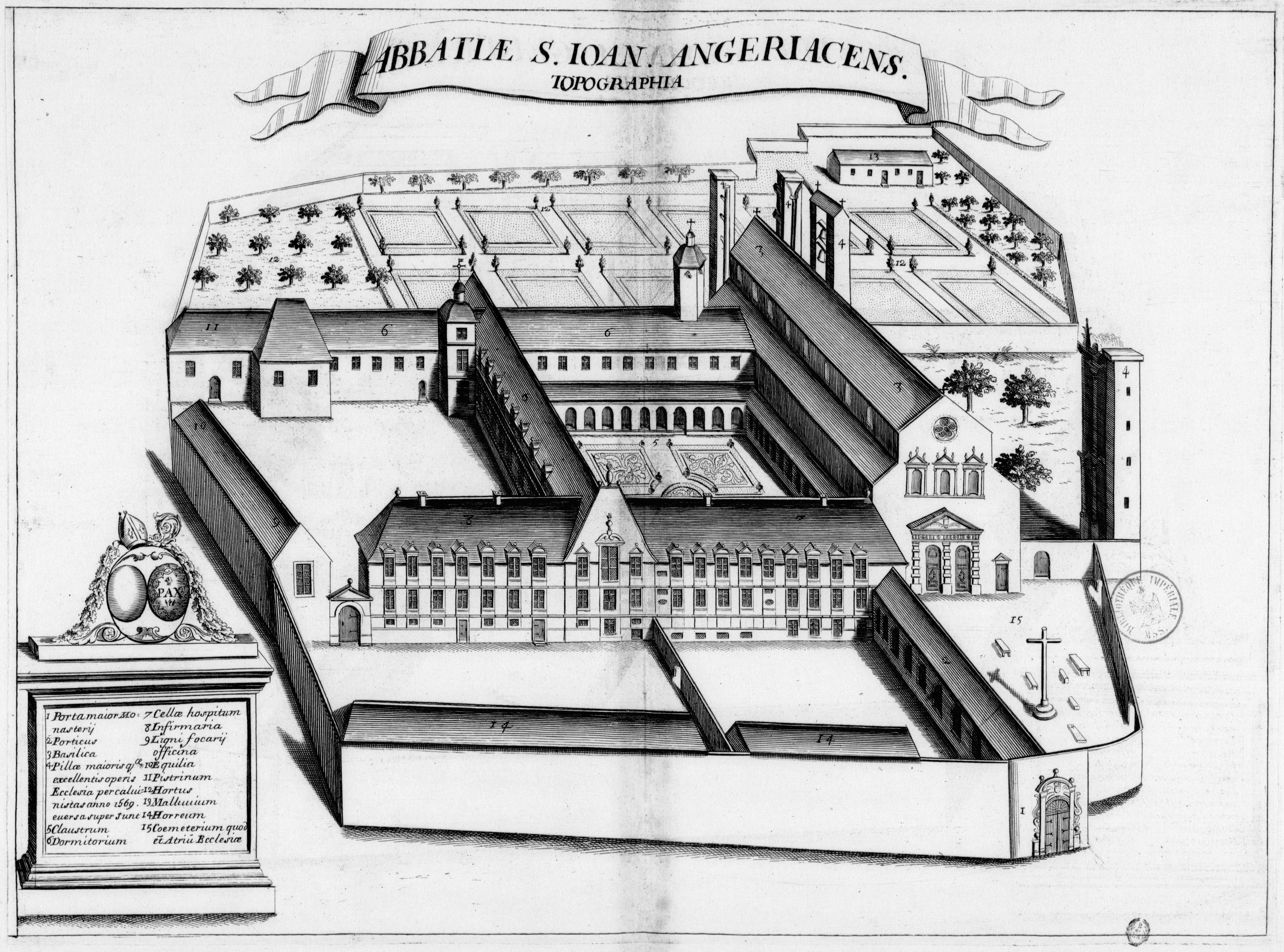 Planche gravée du 17ème siècle représentant l'abbaye de Saint-Jean-d'Angély, en France, dans le livre Monasticon Gallicanum.